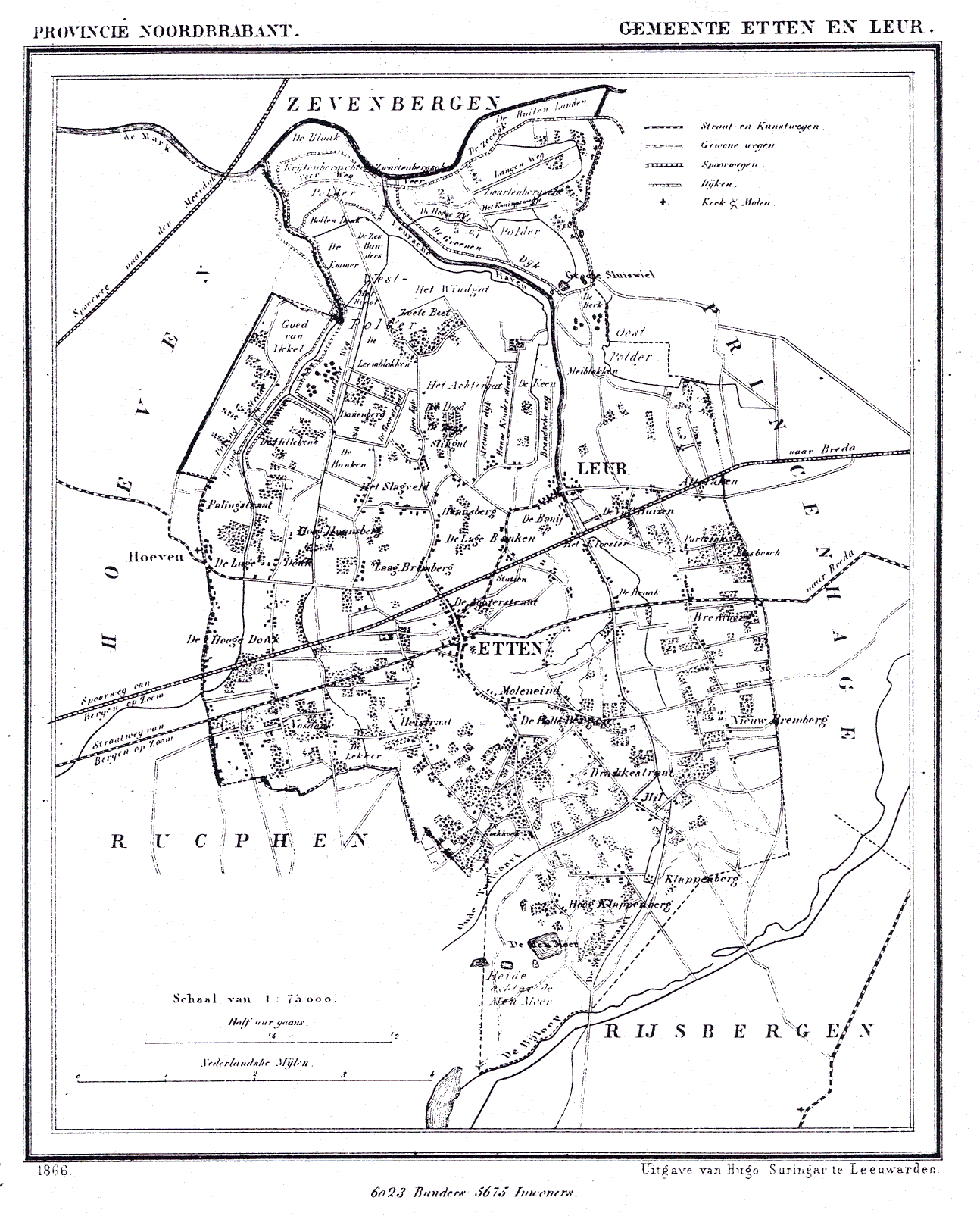 Nederland, Noord-Brabant, Gemeente Etten-Leur